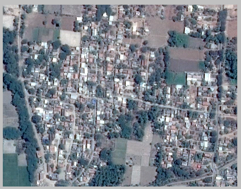 கார்த்திகைப்பட்டி-2